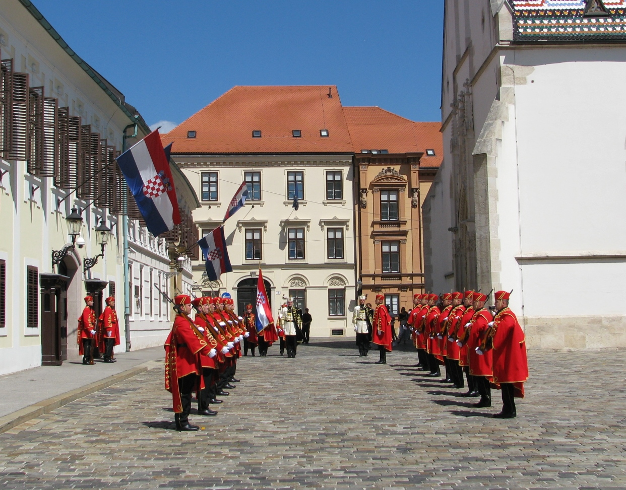 Velika smjena straže ispred Banskih dvora u Zagrebu